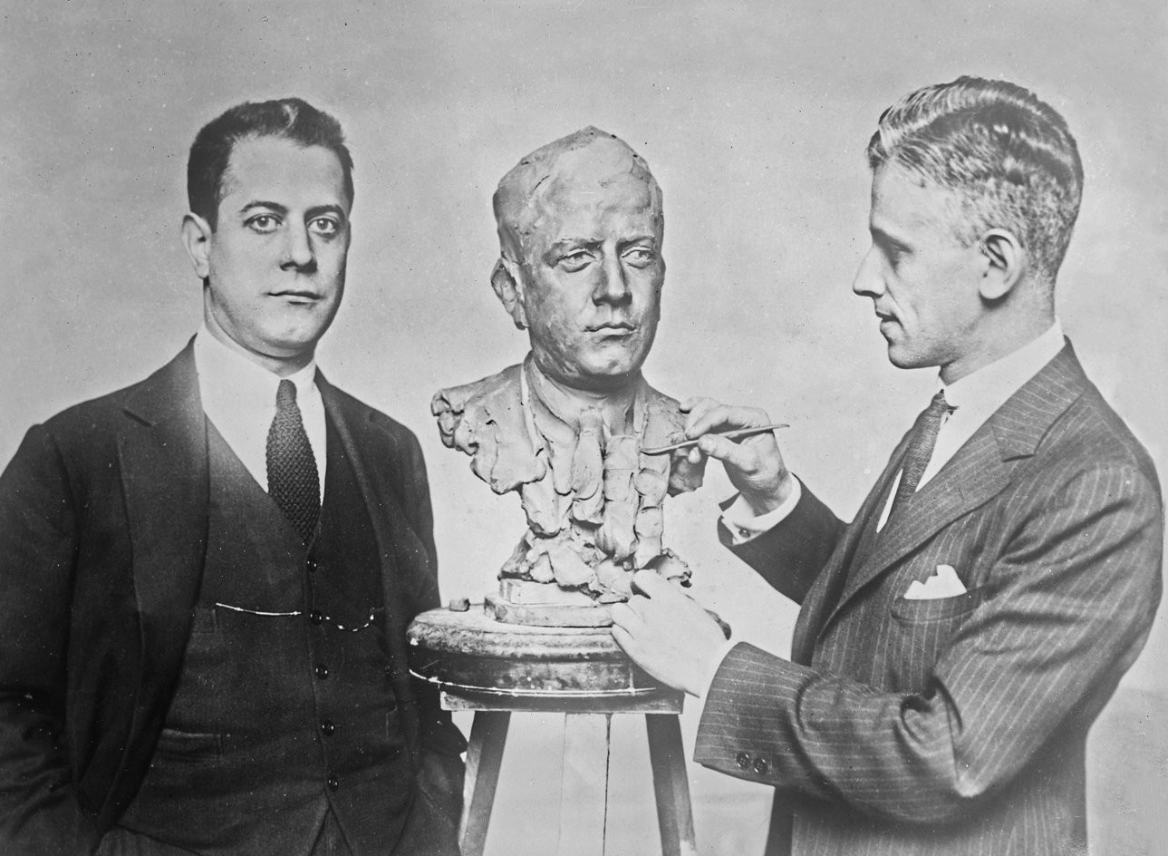 [José Raúl] Capablanca posant pour Drijinsky [i.e. Gleb W. Derujinsky] : [photographie de presse] / [Agence Rol]